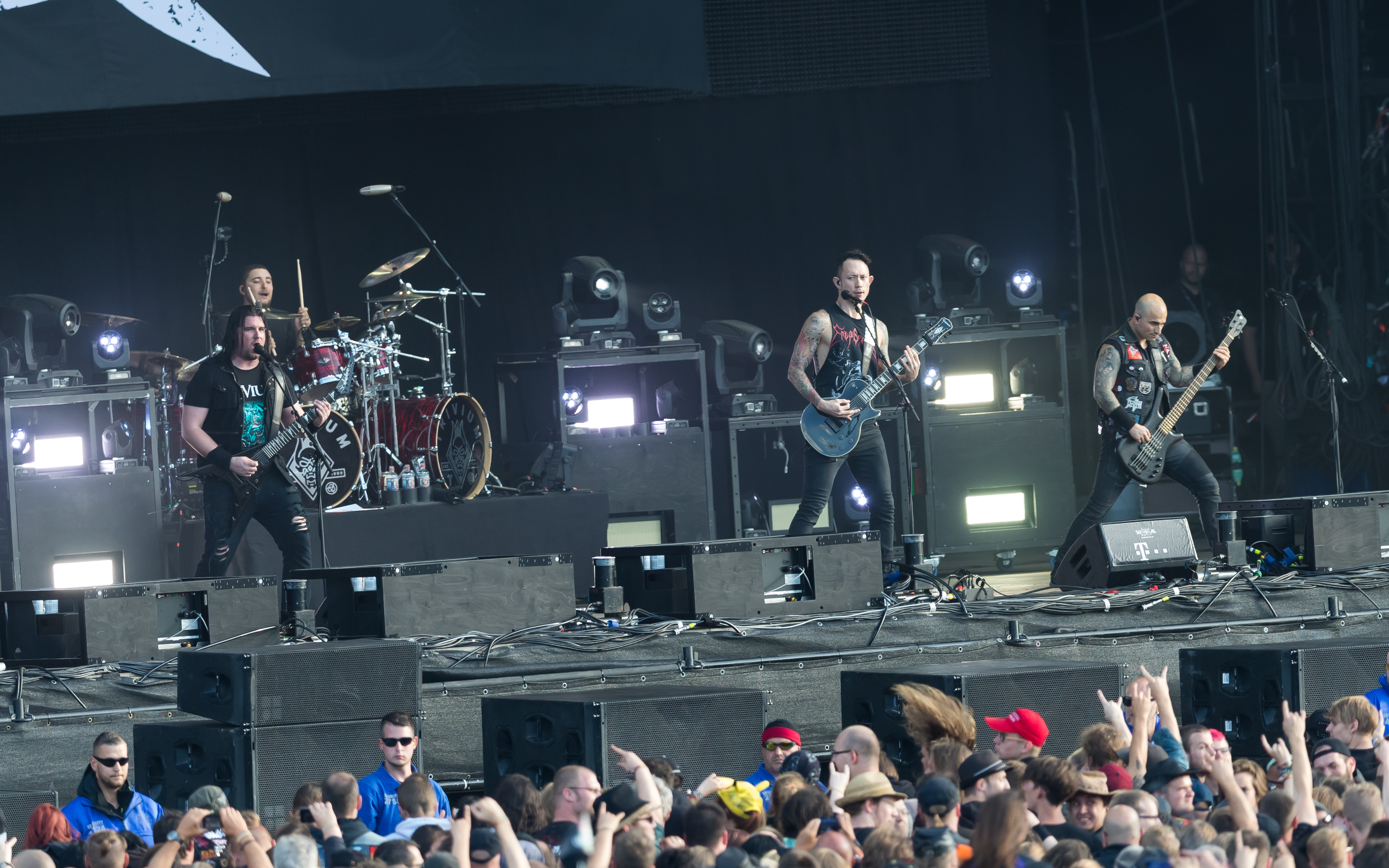 Trivium during Wacken Open Air at Schleswig-Holstein, Wacken, , Germany on 2017-08-04, Photo: Sven Mandel